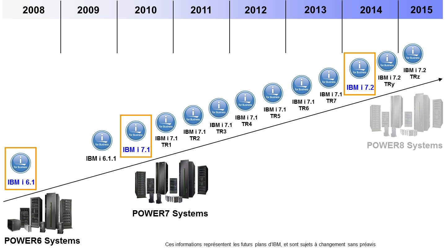 Roadmap IBM i (novembre 2013)